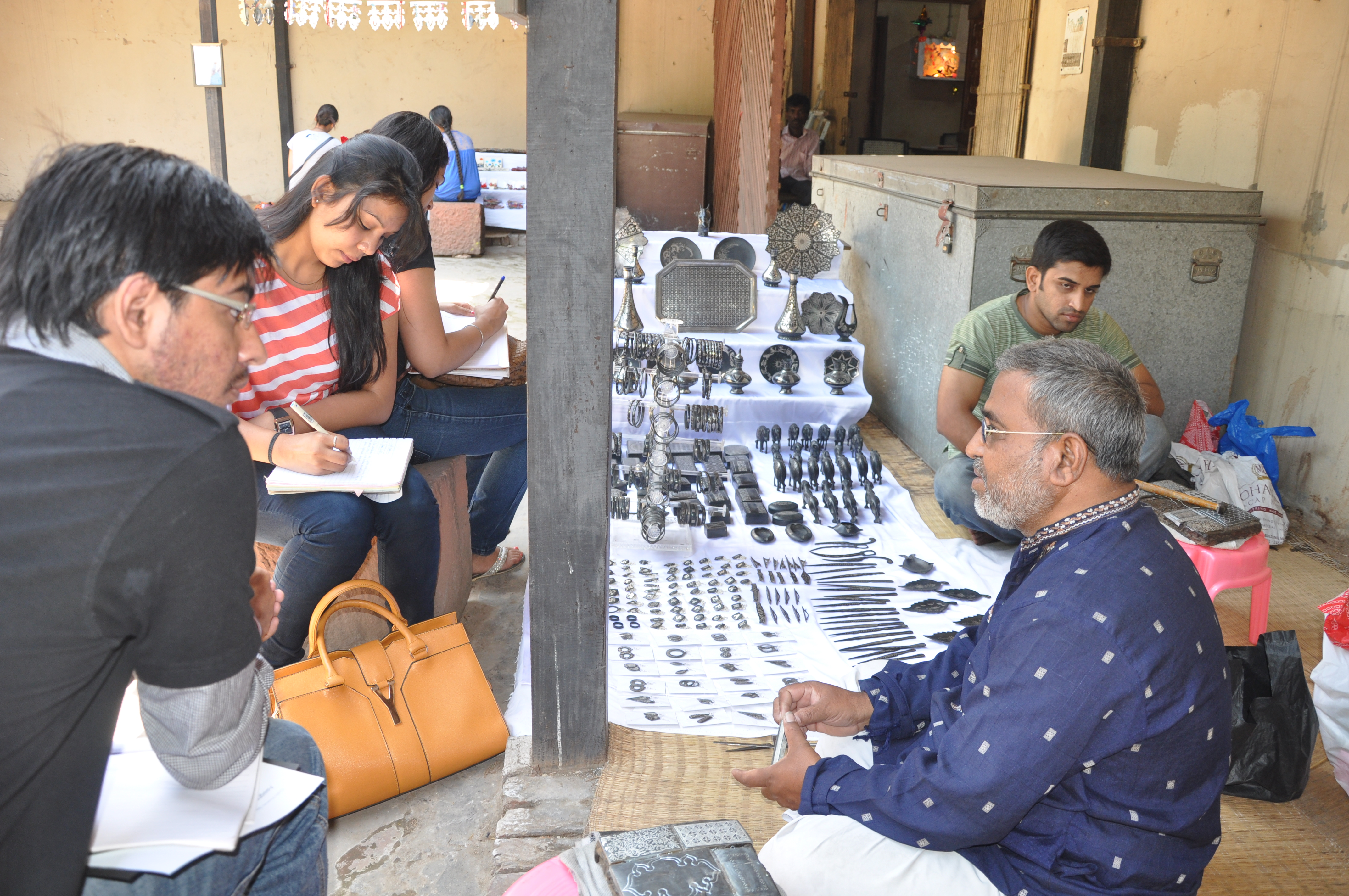 Crafts Demonstration Programme